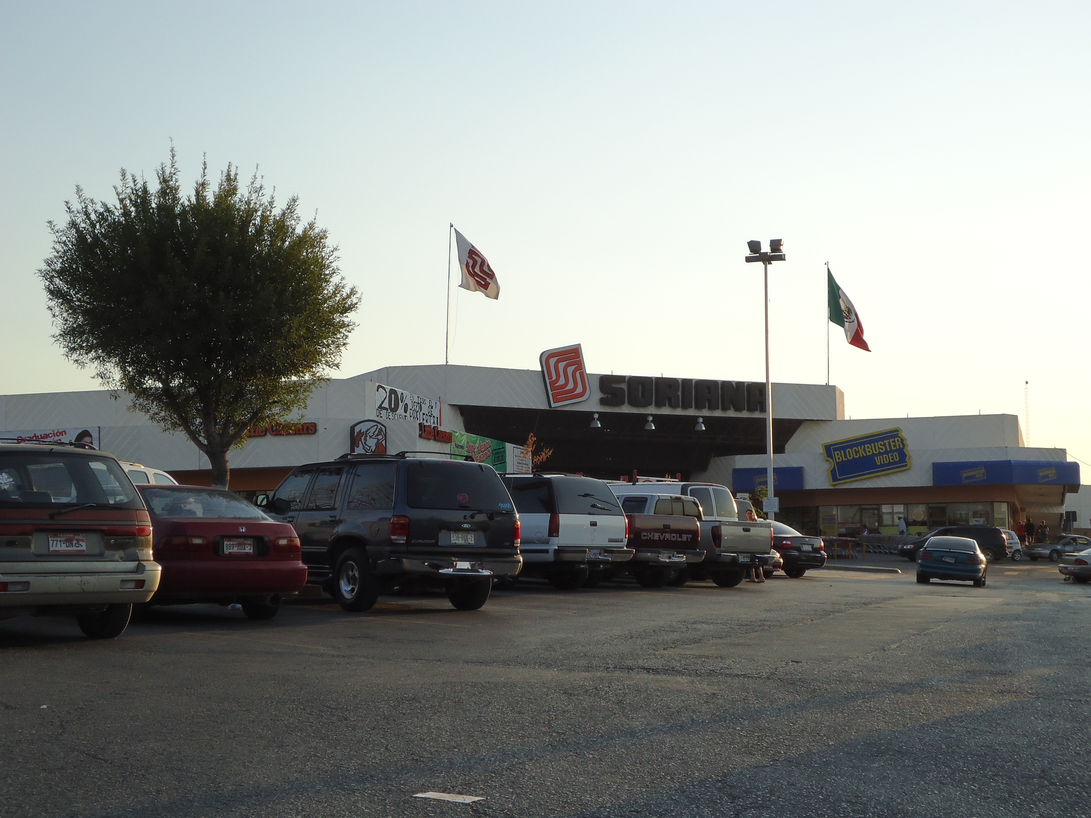 Primera tienda SORIANA en la ciudad (SORIANA sucursal Piedras Negras)